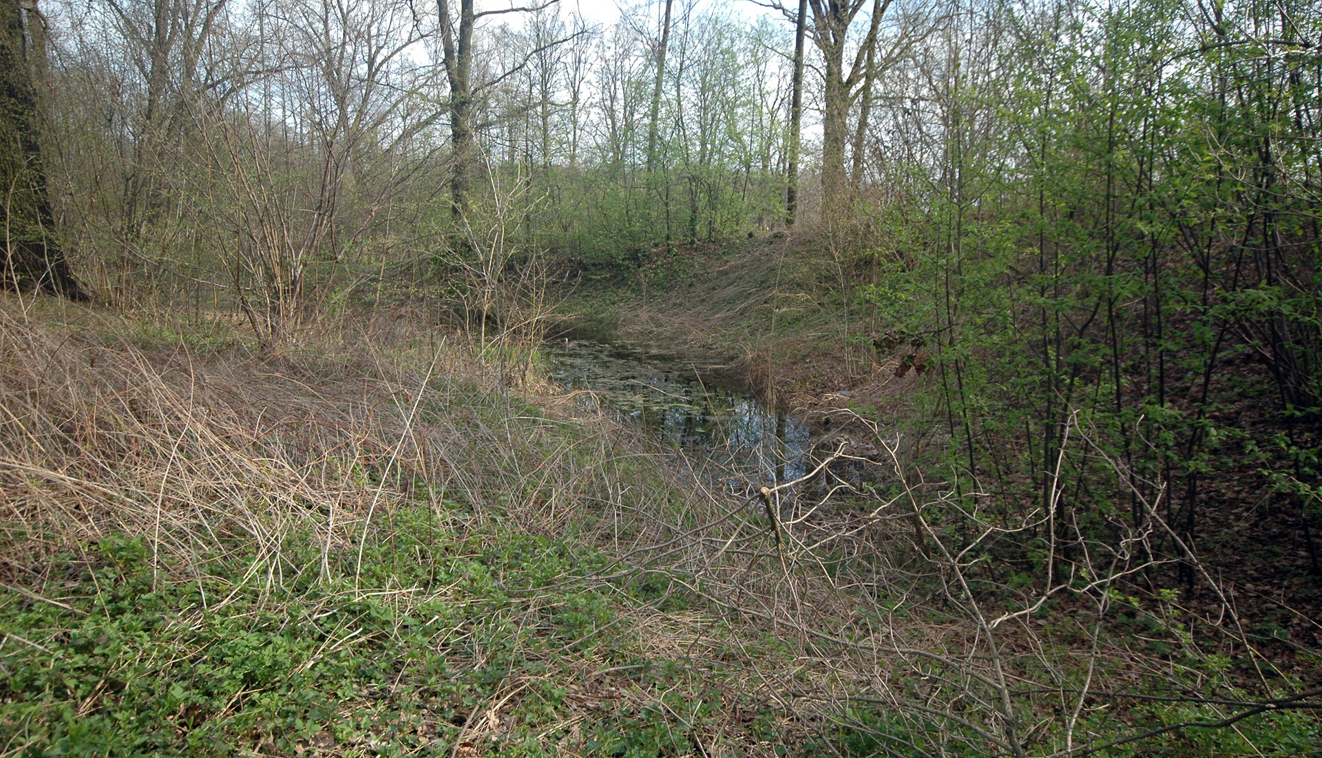 relikty zamku ( także stanowisko archeologiczne wpisane do rejestru zabytków)- założenie ogrodowe Chałupki, Kamieniec Ząbkowicki